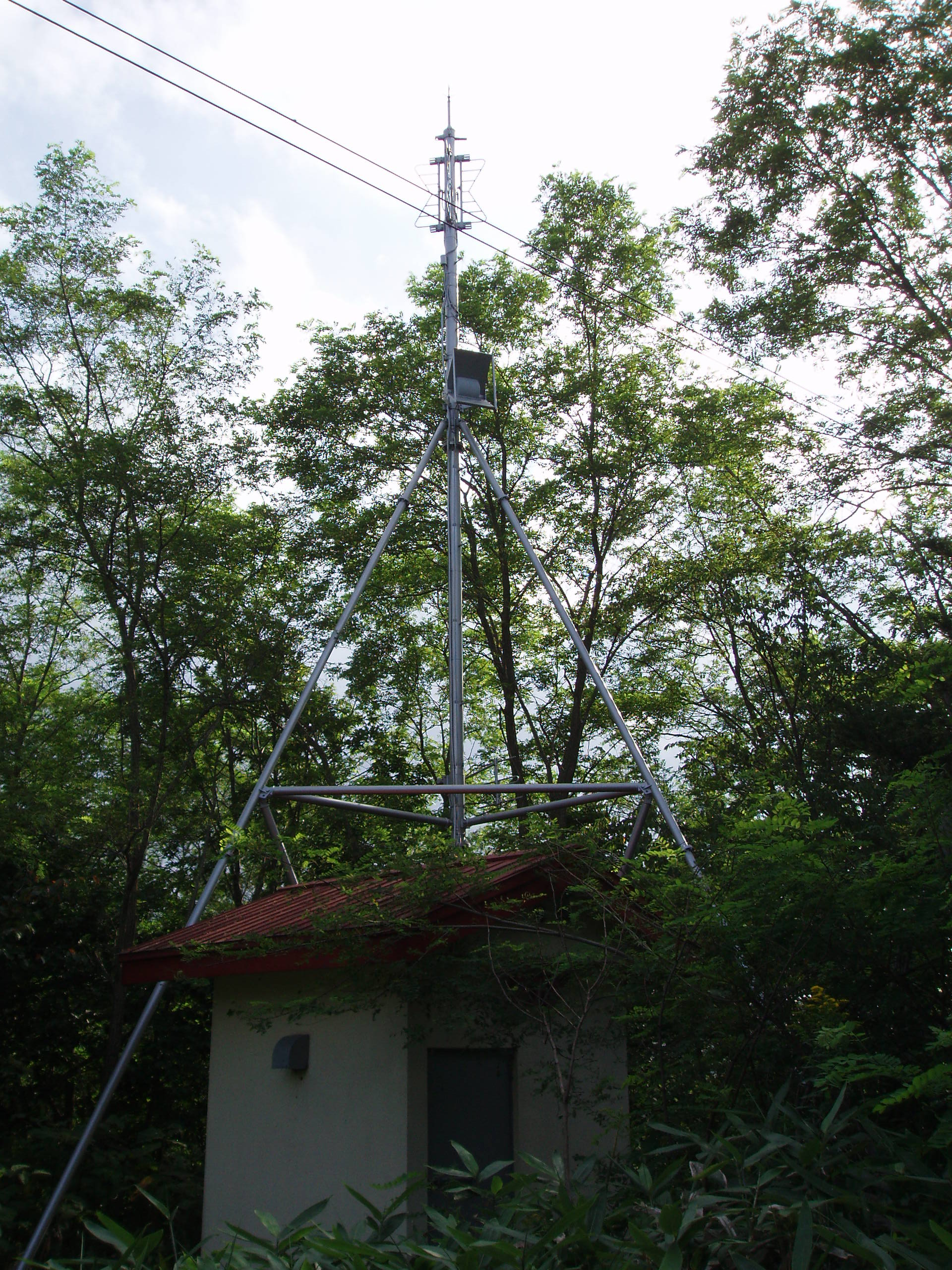 上砂川中継局 STV送信設備